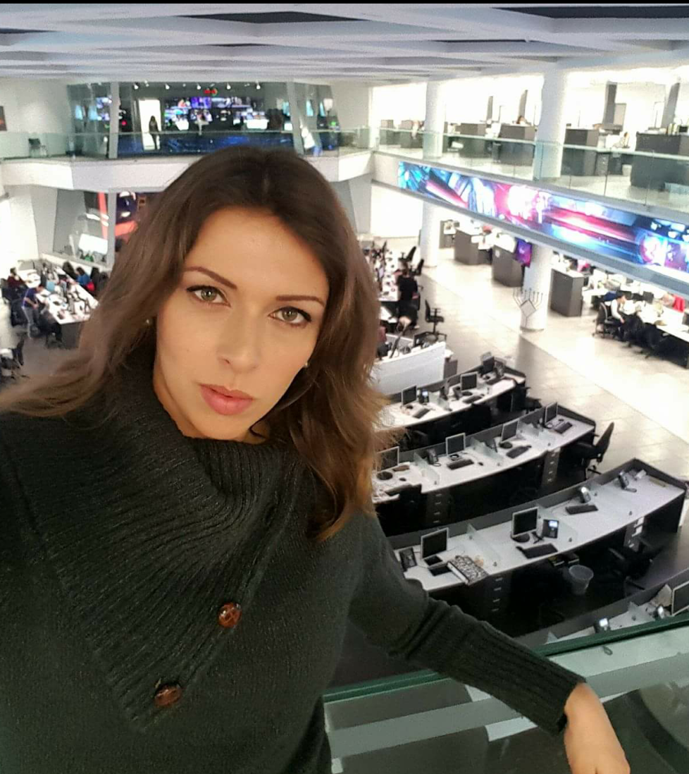 נועה לביא